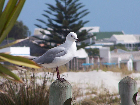 'n Seeumeeu op Langebaan se strand